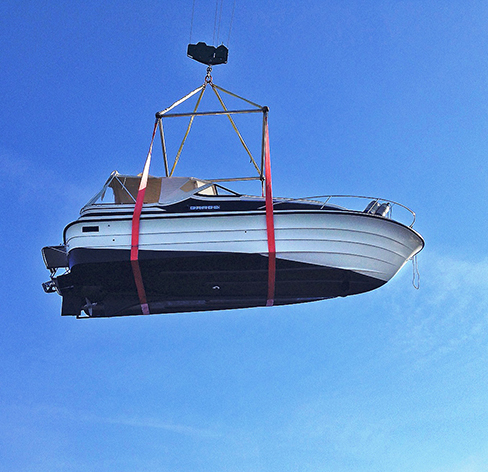 Draco Tricab 2700, norsk cabincruiser produsert midt på 1980-tallet